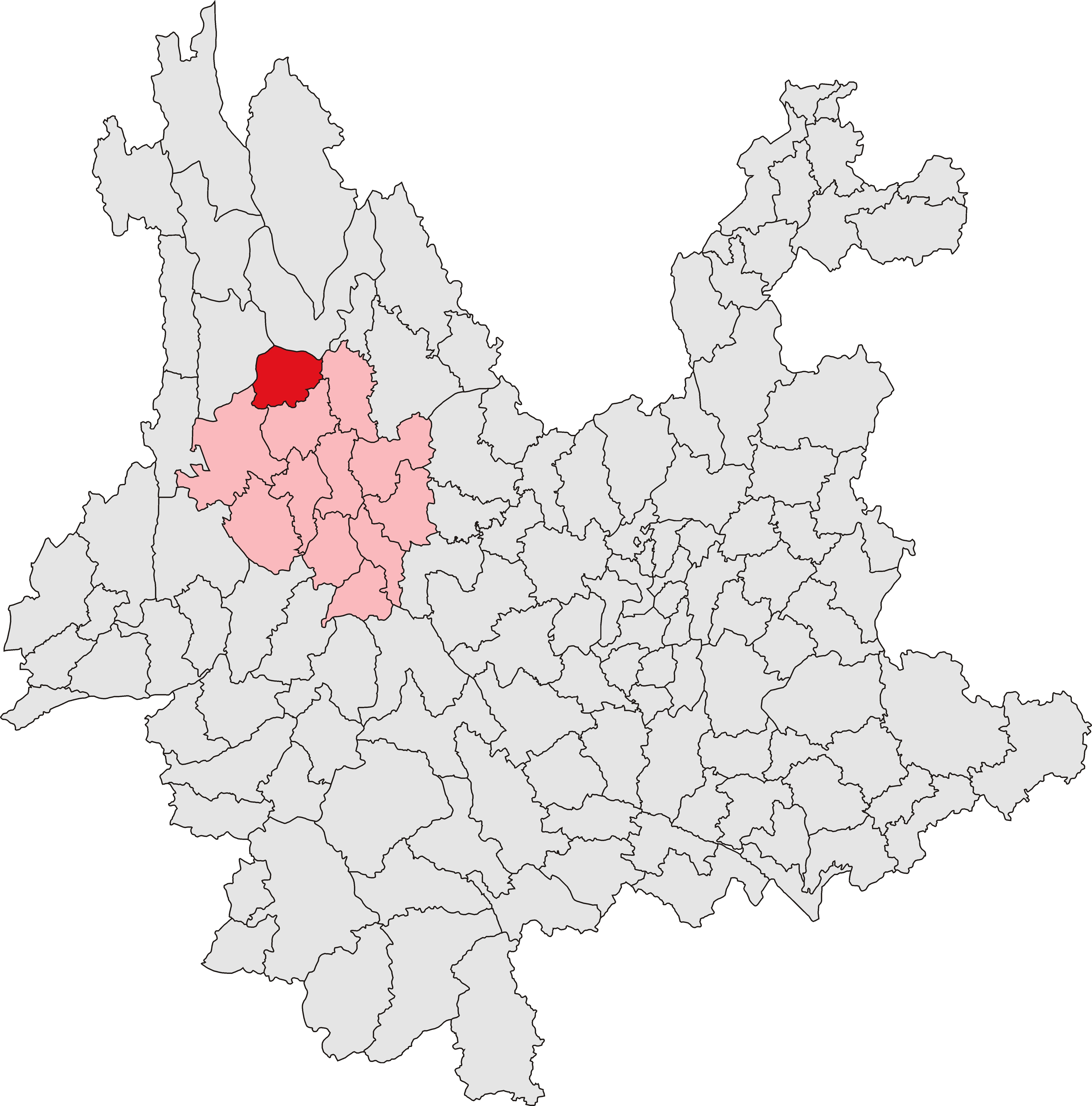 中文（中国大陆）: 剑川县位置图